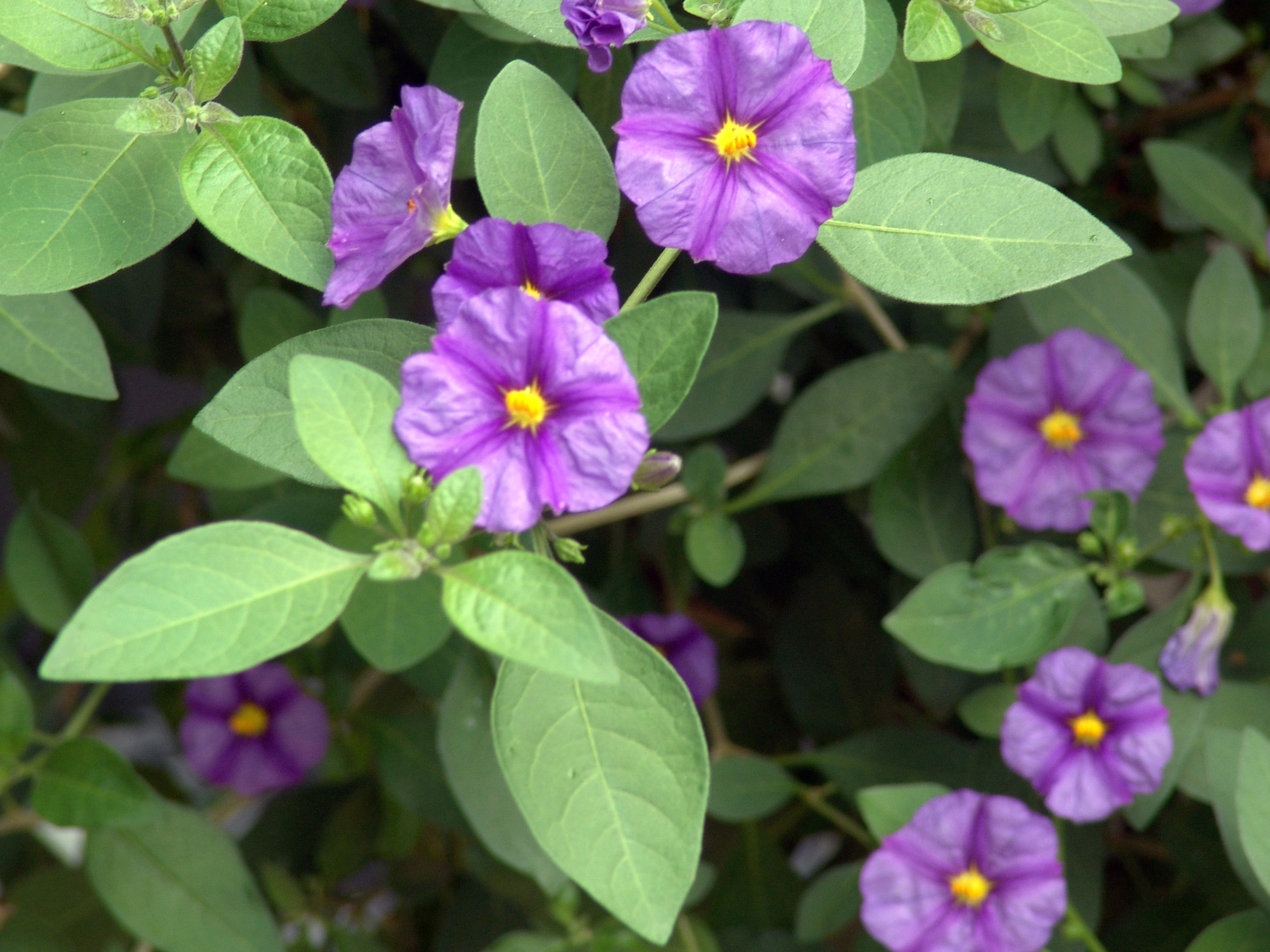 Lycianthes rantonnei (Synonym: Solanum rantonnetii)